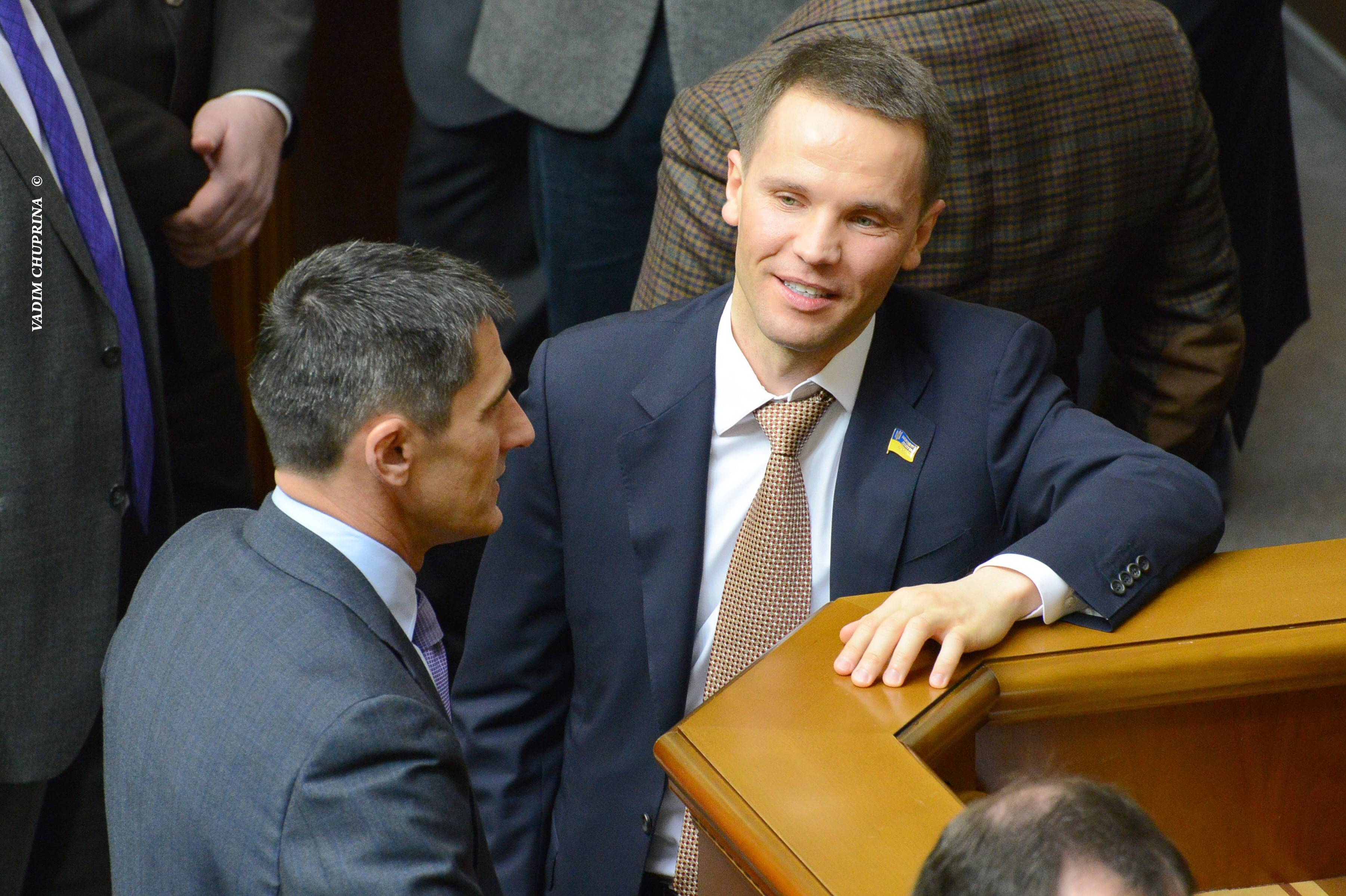 ВЕРХОВНА РАДА УКРАЇНИ 2013 , фото Вадим Чуприна ©